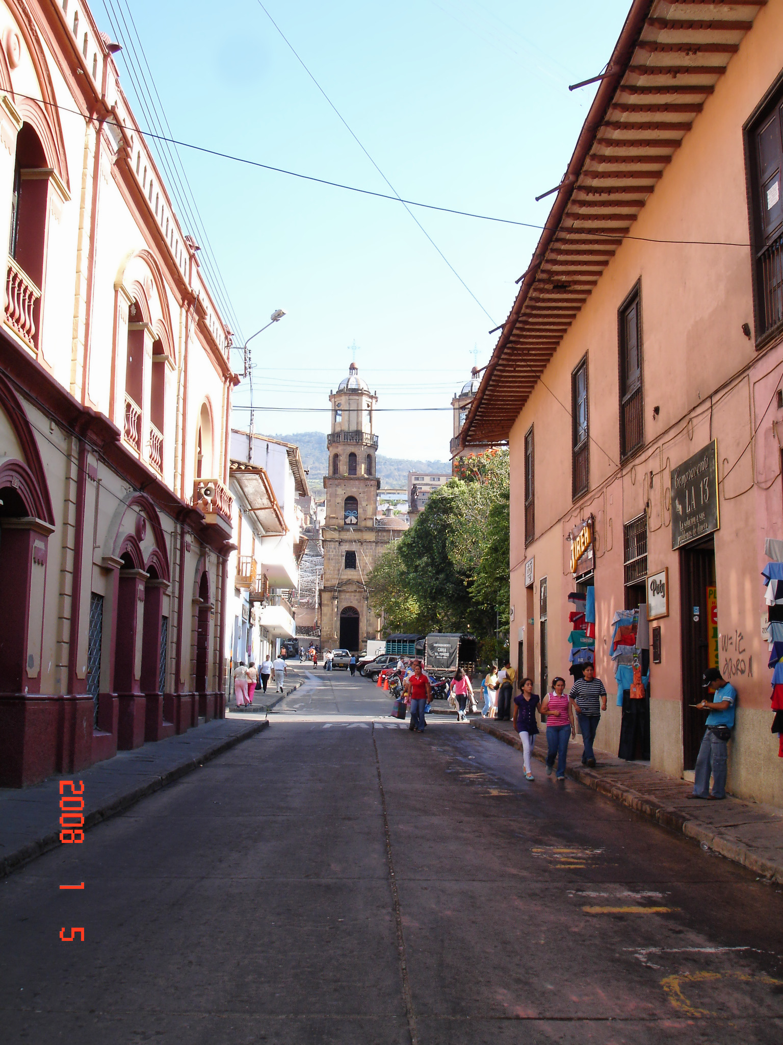 Sector Antiguo de la Ciudad de San Gil